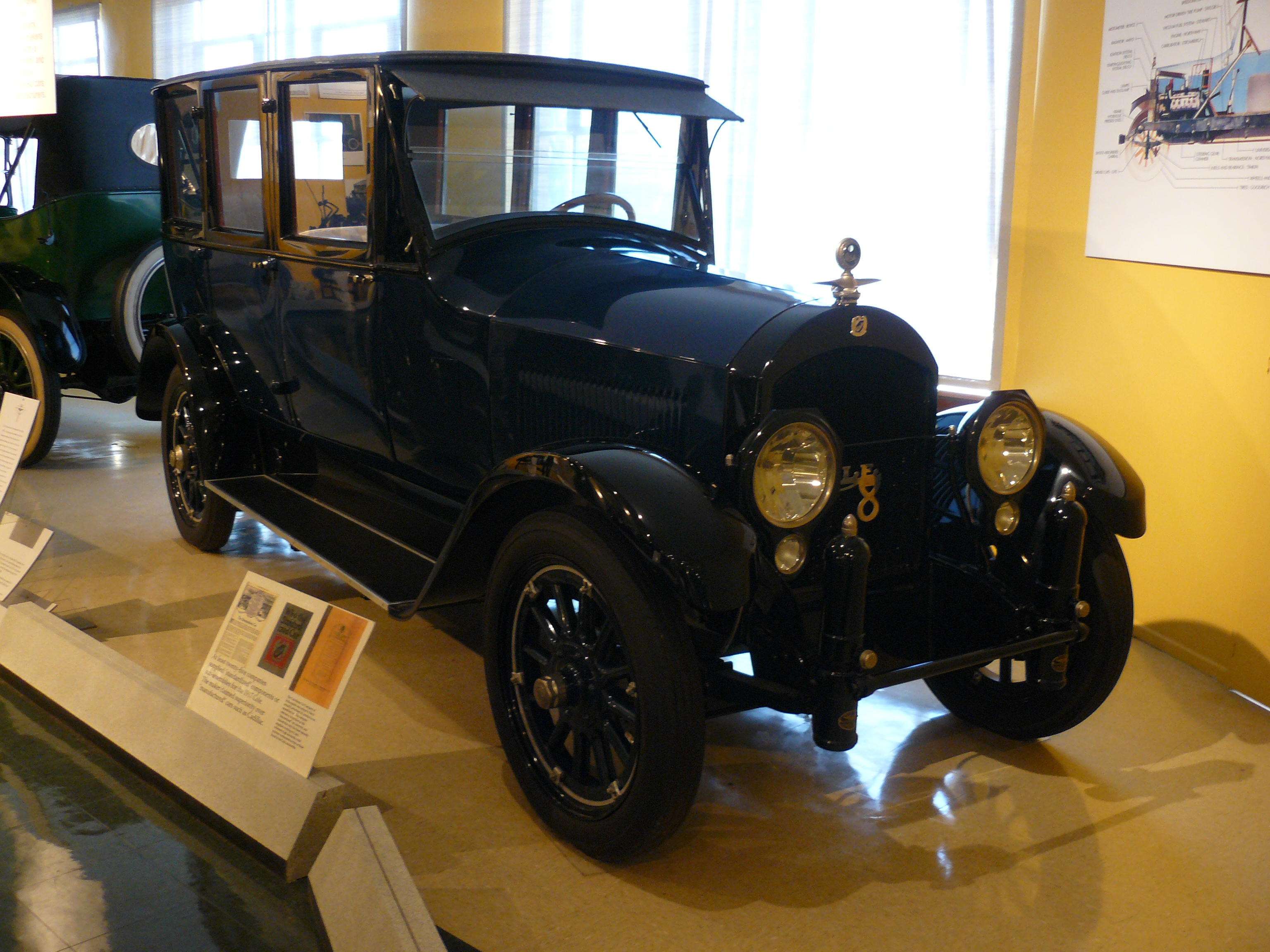 Auburn 2013